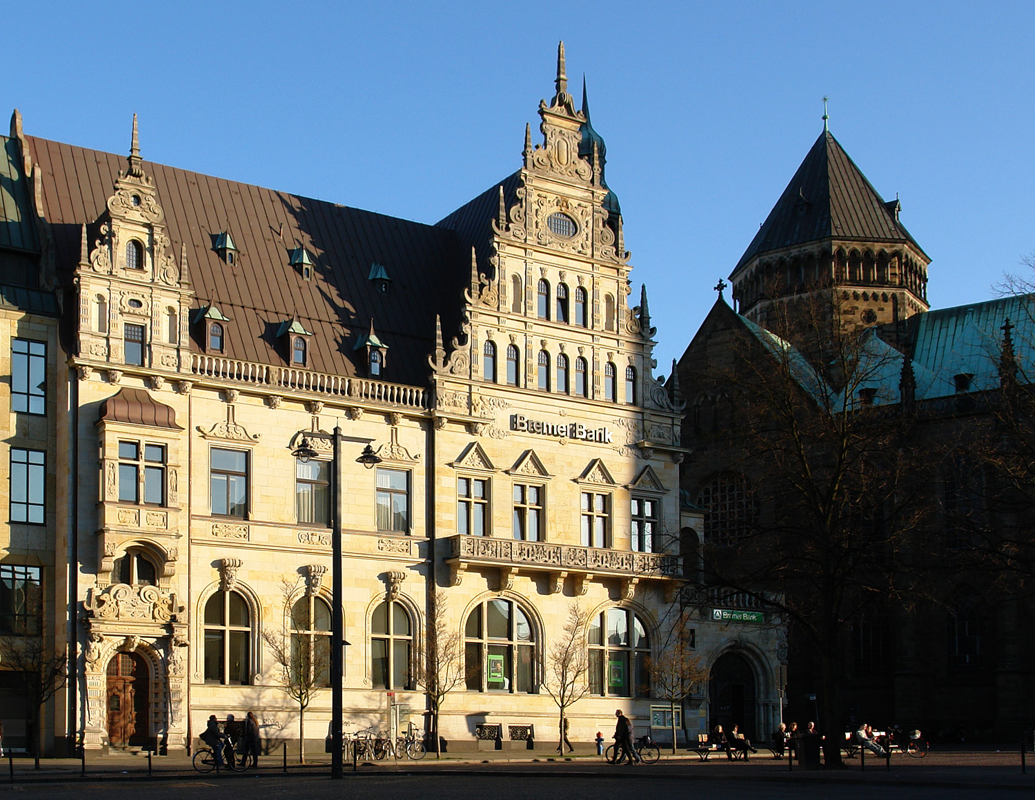 Bremer Bank (historischer Teil) neben dem Petri-Dom